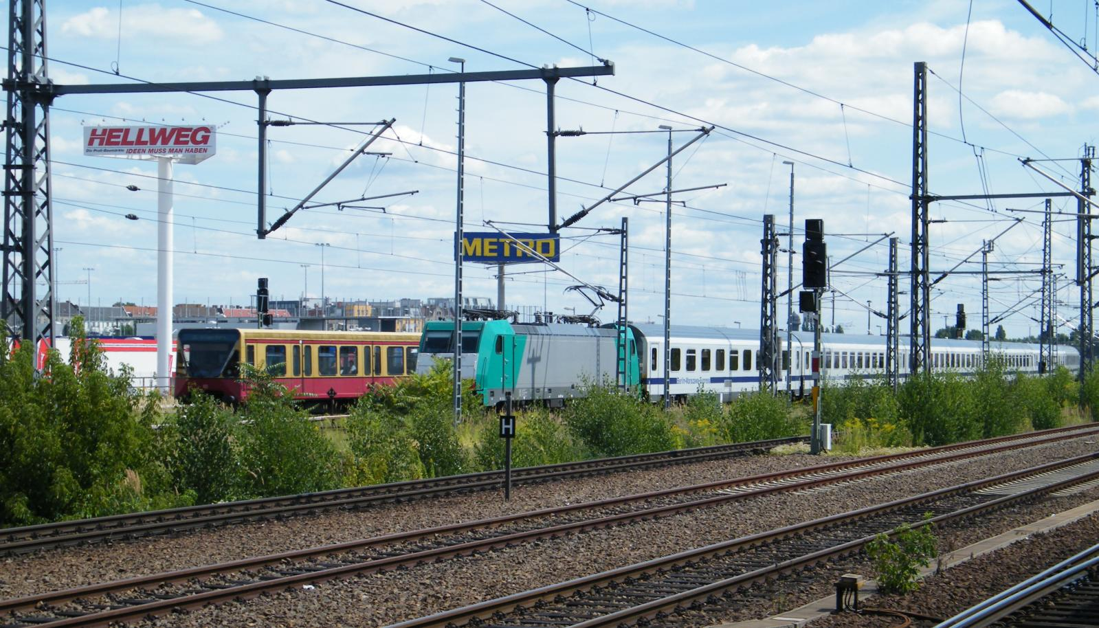 The following is the author's description of the photograph quoted directly from the photograph's Flickr page. "Der Fernzug aus Warschau fährt in den Berliner Ostbahnhof ein. Gezogen wird der Zug von einer Mehrsystem-Lok von Bombardier aus dem Bestand der Leasinggesellschaft "Angel Trains" "